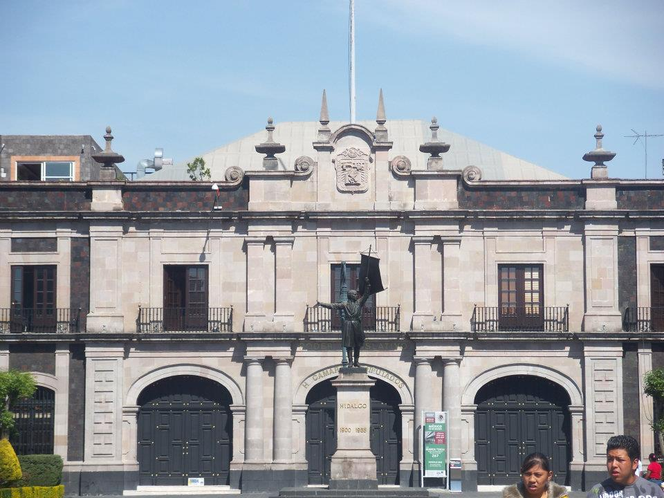 Palacio Legislativo de la H. Cámara de Diputados del Estado de México. Toluca de Lerdo, Estado de México.